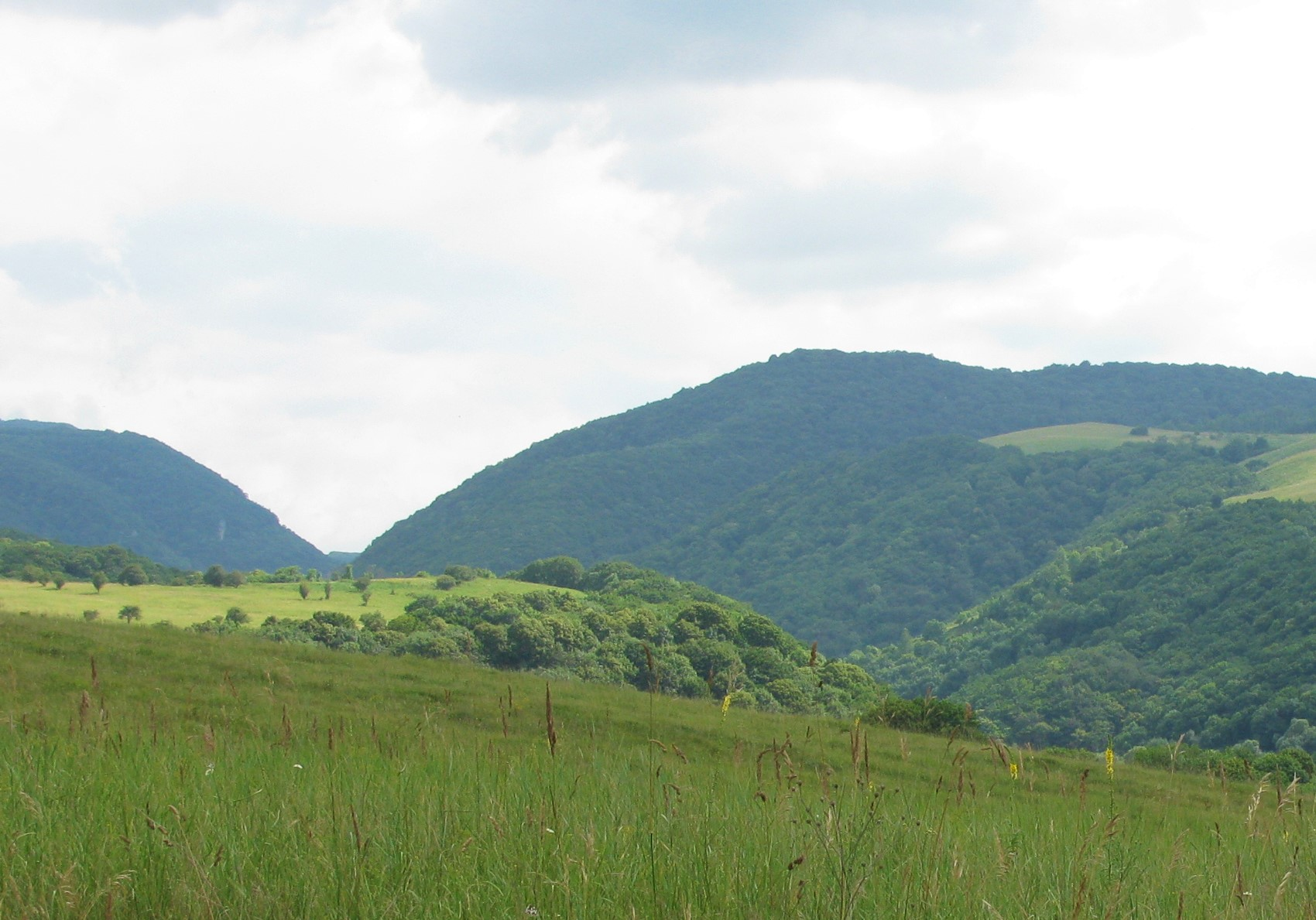 Кувинское ущелье: У хутора Ильич,Отрадненский район, Краснодарский край This image is related to the protected area of Russia number 2320265